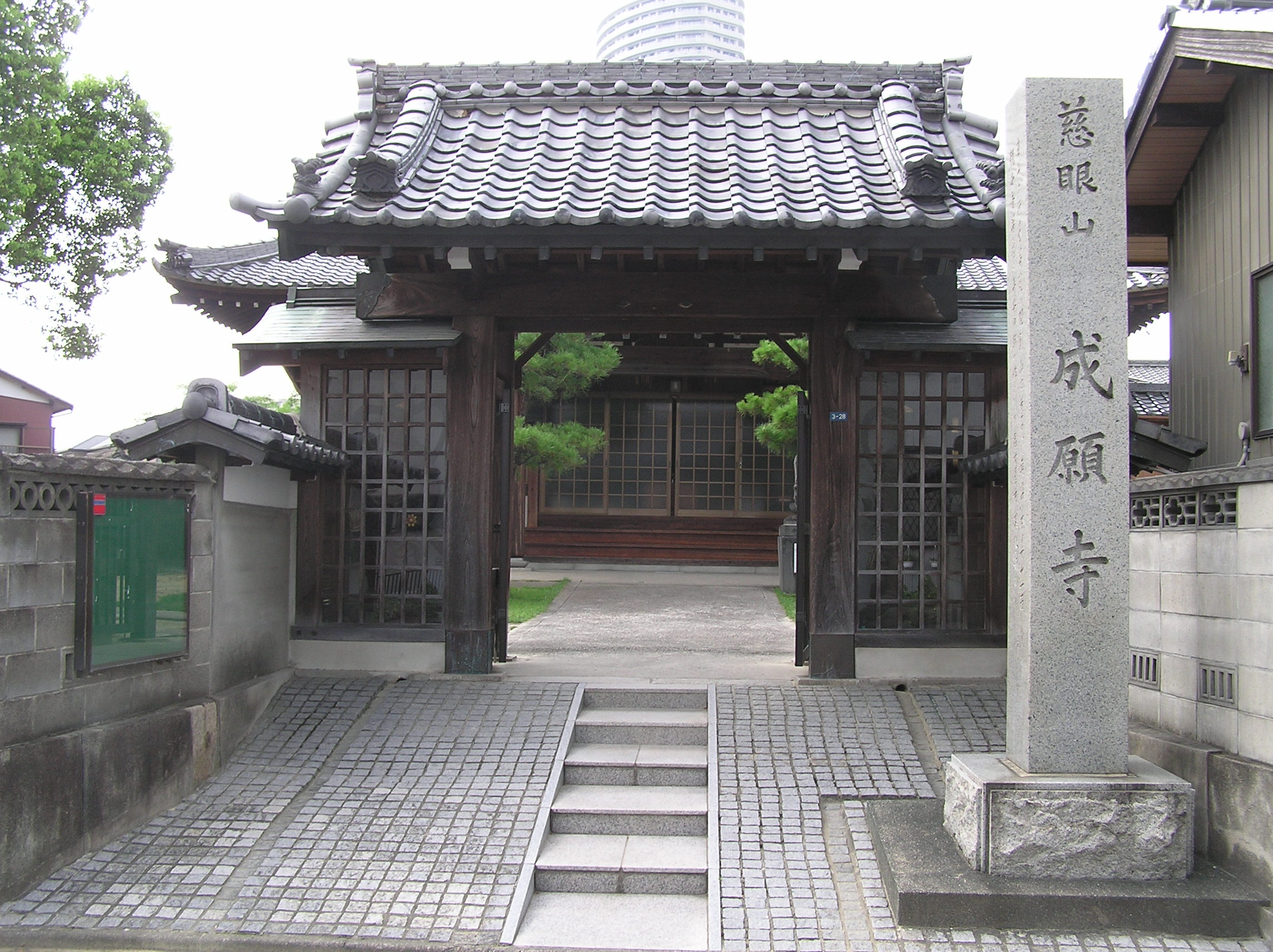 名古屋市北区成願寺にある成願寺の正面。2007年（平成19年）夏に撮影したもの。